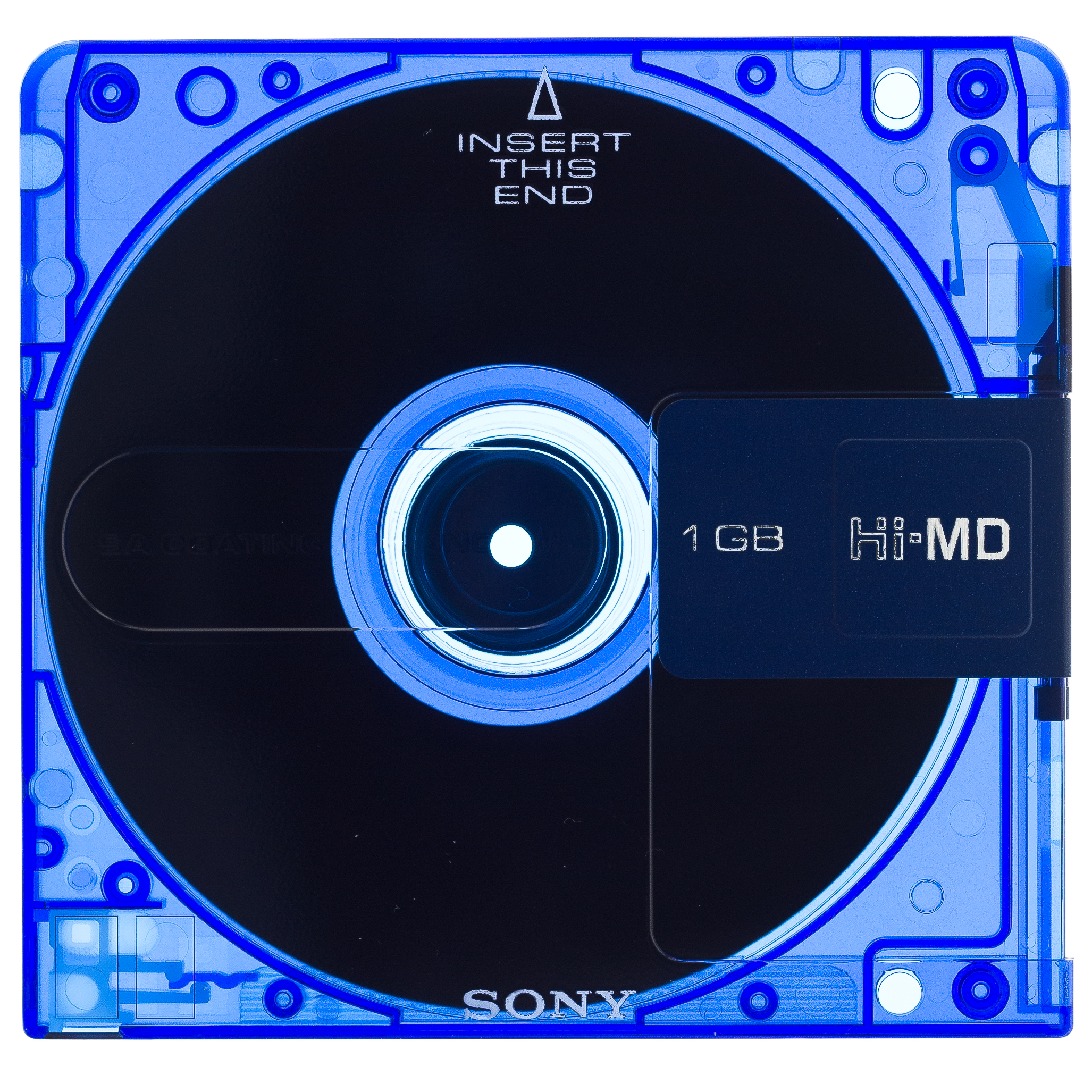 Sony Hi-MD minidisc retro-iluminado, donde se aprecian los detalles